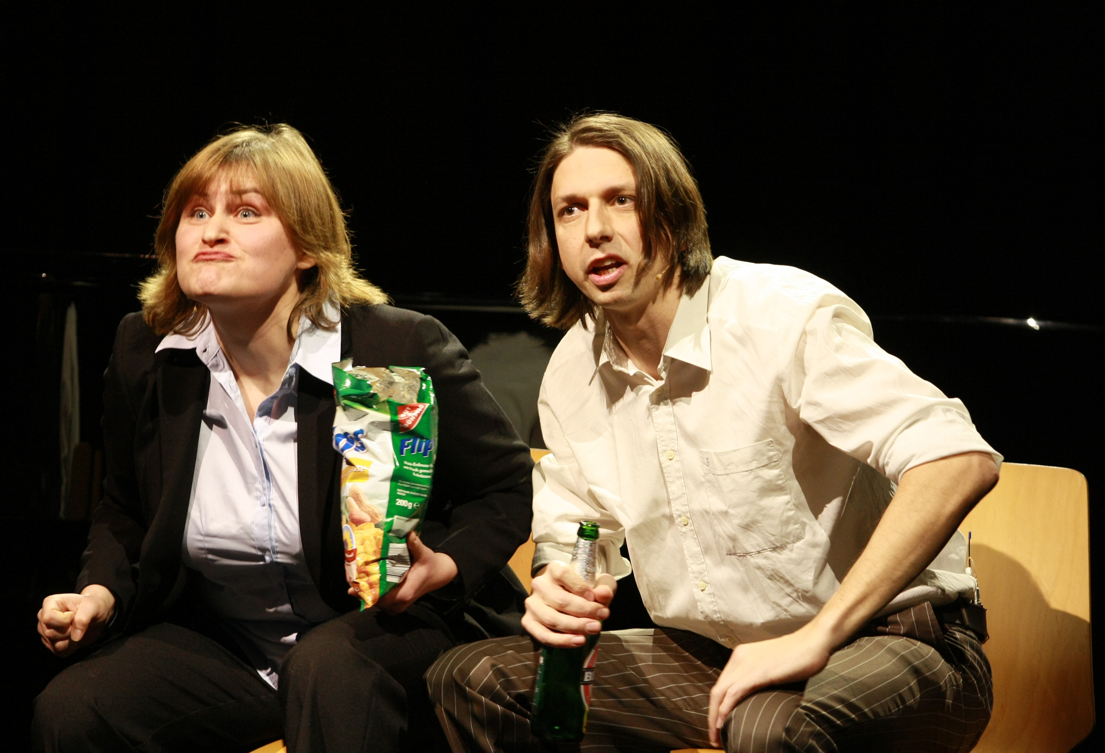 Das Ensemble Weltkritik, Leipziger Kabarett-Duo (Bettina Prokert und Maxim Hofmann). Hier während eines Aufritts am 26.01.2012 auf der Freiburger Kulturbörse, Theatersaal 1